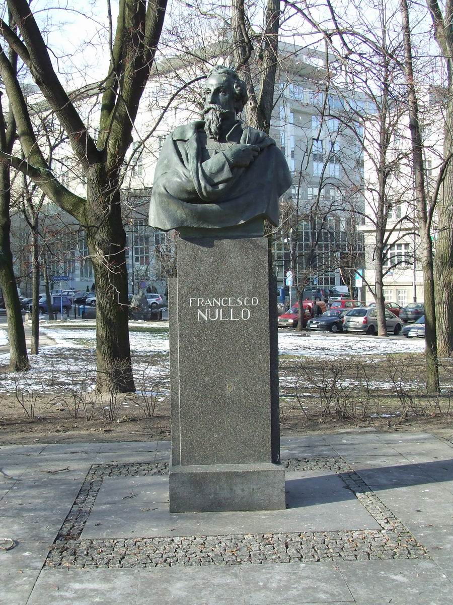 Francesco Nullo (Italian patriot) monument, Frascatti street, Warsaw, Poland.